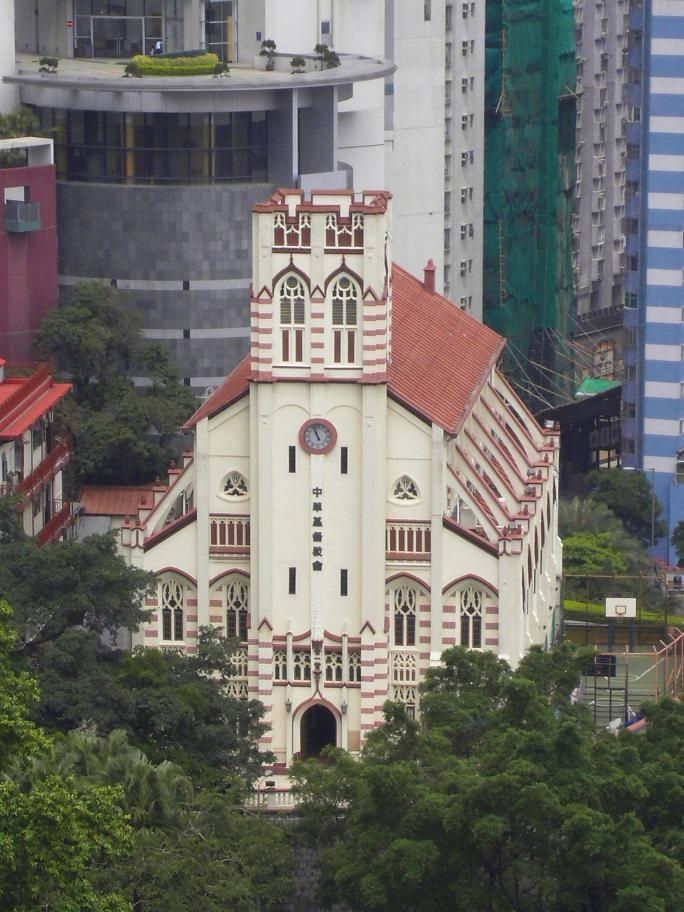 中文（香港）: 中華基督教會合一堂香港堂